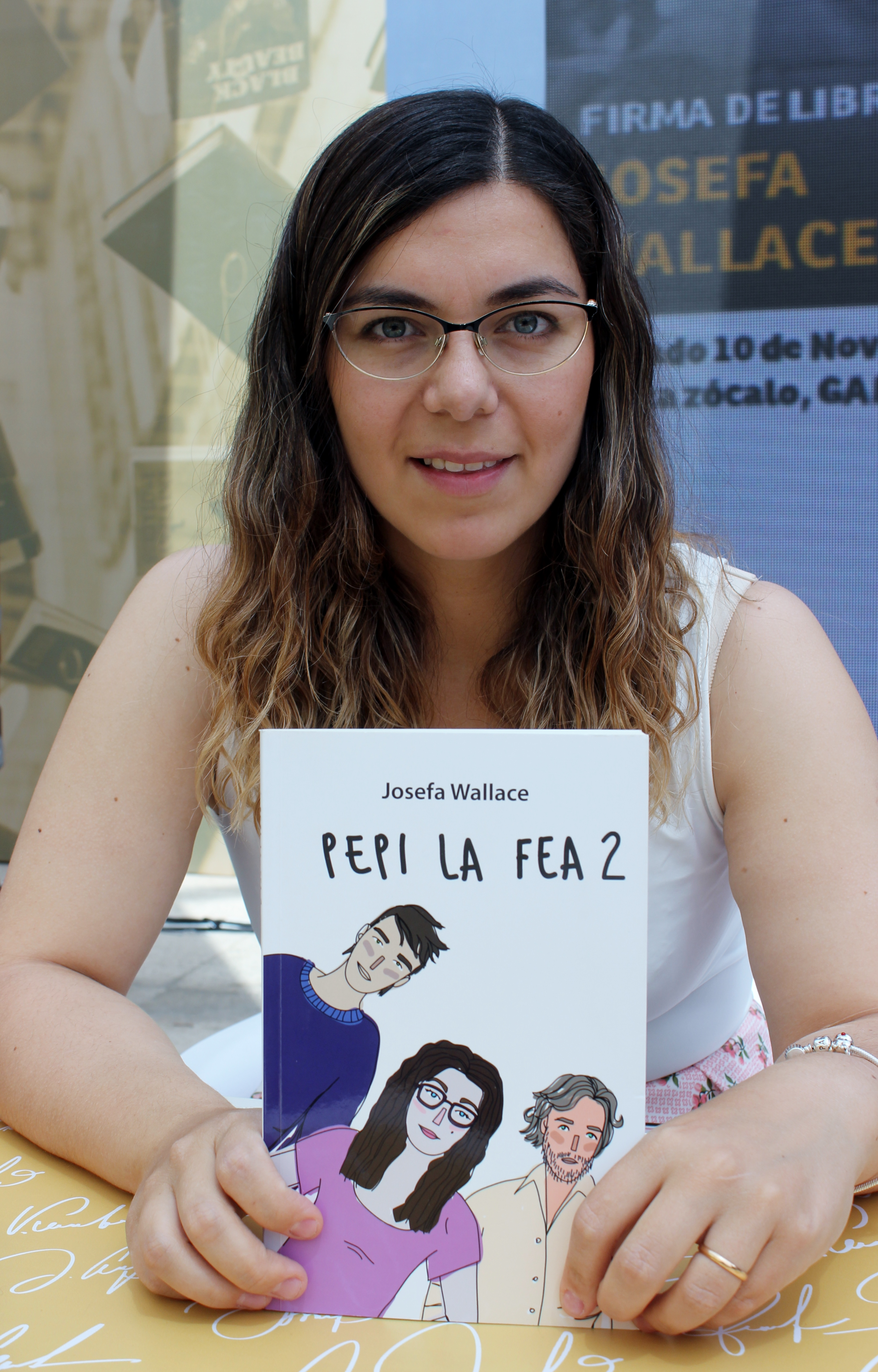 La escritora chilena Josefa Wallace durante una sesión de firma de libros en la segunda etapa del Festival de Autores de Santiago 2018 realizada en el GAM.